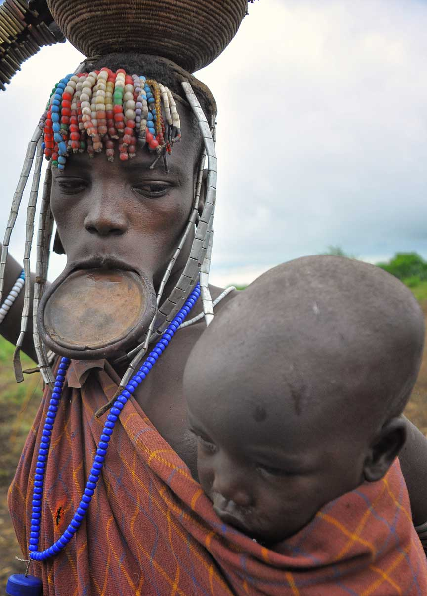 Ethiopia